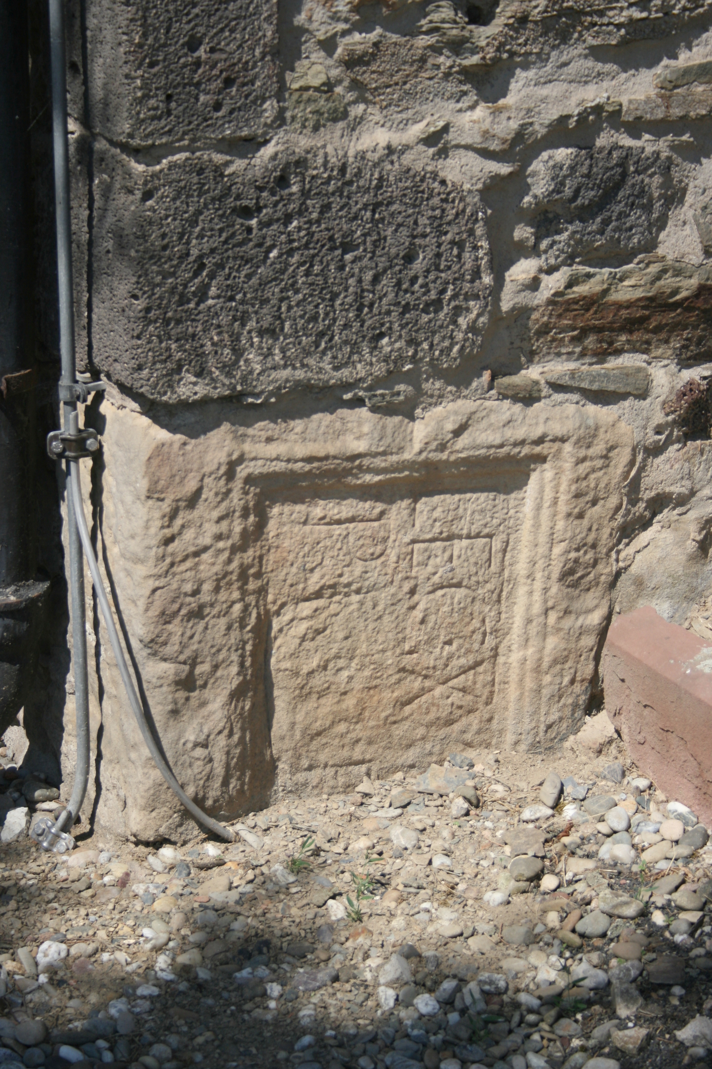 Ober-Mörlen-Langenhain, Wetteraukreis, Hessen. Inschrift mit Nennung der Legio XXII, in der Außenmauer der Langenhainer Kirche verbaut ; CIL XIII, 7435.